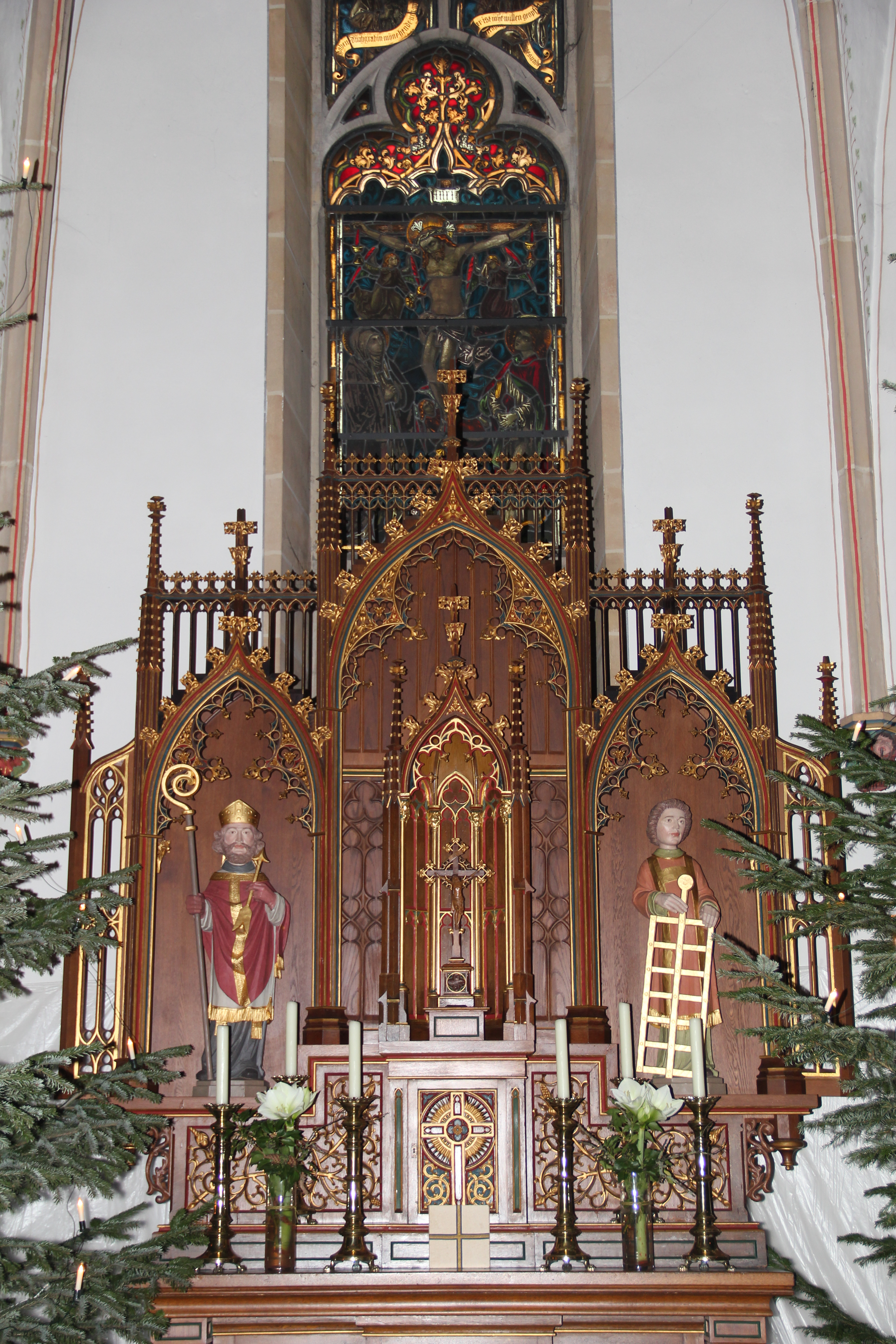 Hochaltar der Sankt-Lambertus-Kirche in Langenberg